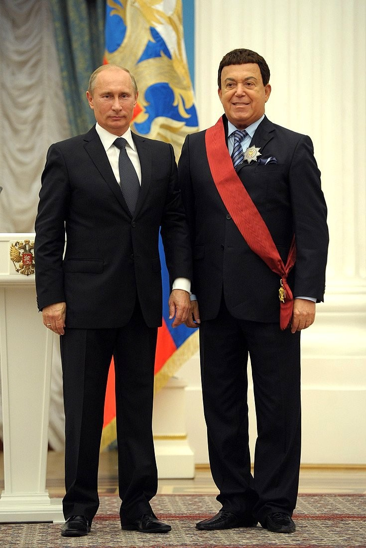 Награждение Иосифа Кобзона Орденом "За заслуги перед Отечеством" I степени